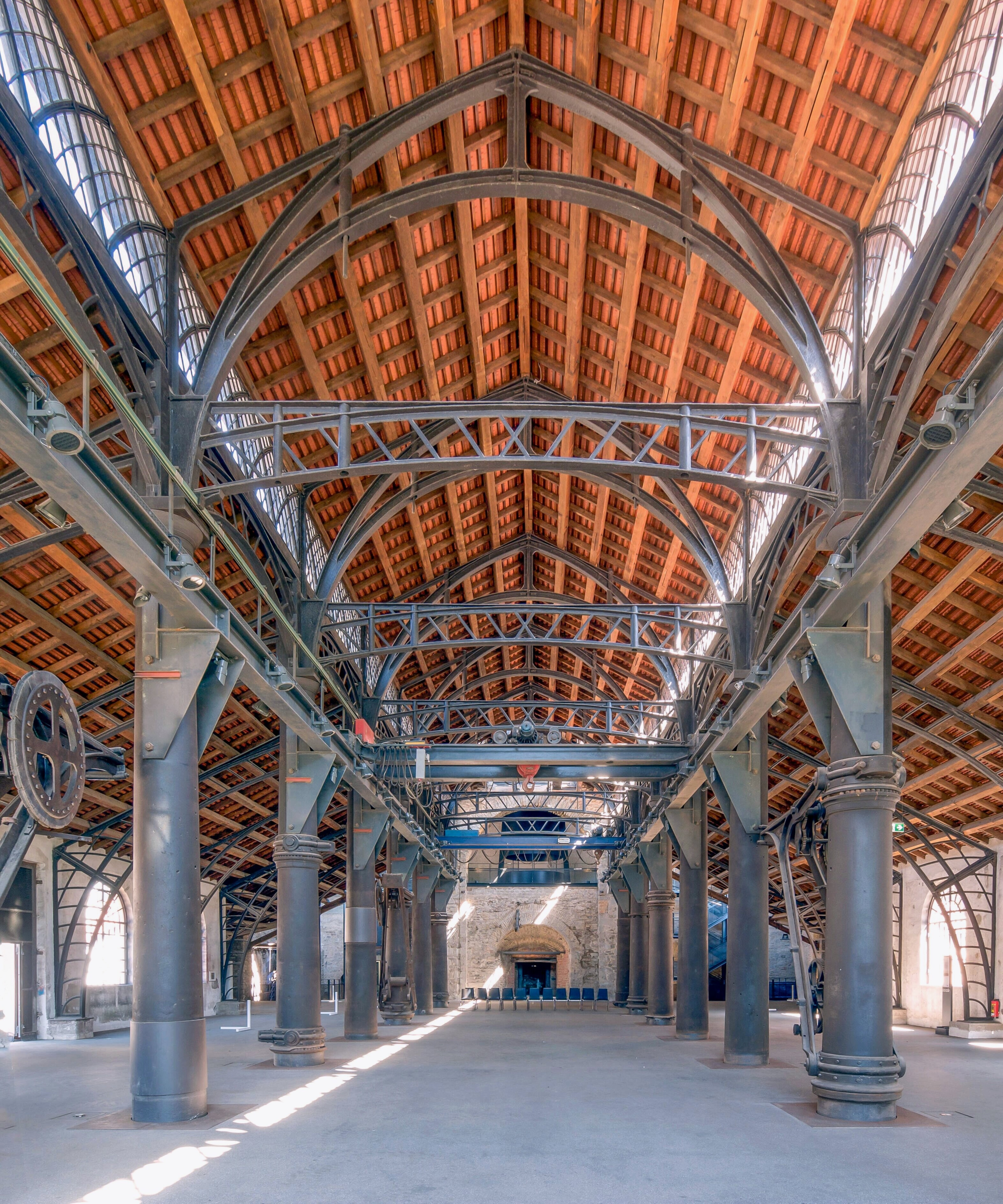 Das Innere der Gießhalle mit dem Tragwerk aus Gusseisen.